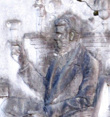 Karl Ferdinand Thewalt - Grab-Portrait Melaten-Friedhof